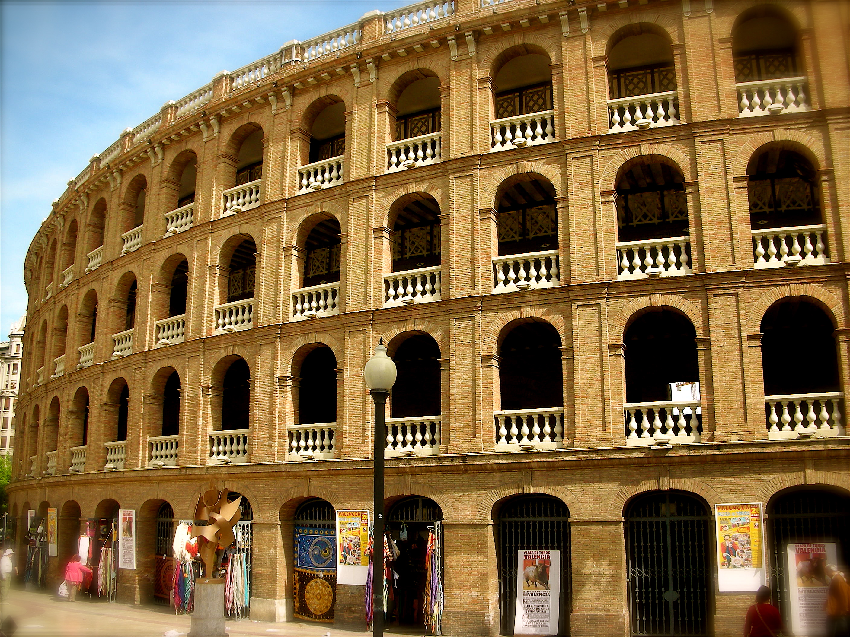 Plaza de Toros de Valencia, junto a la Estación del Norte.